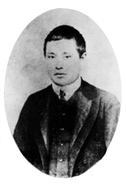 1912年熊秉坤照片